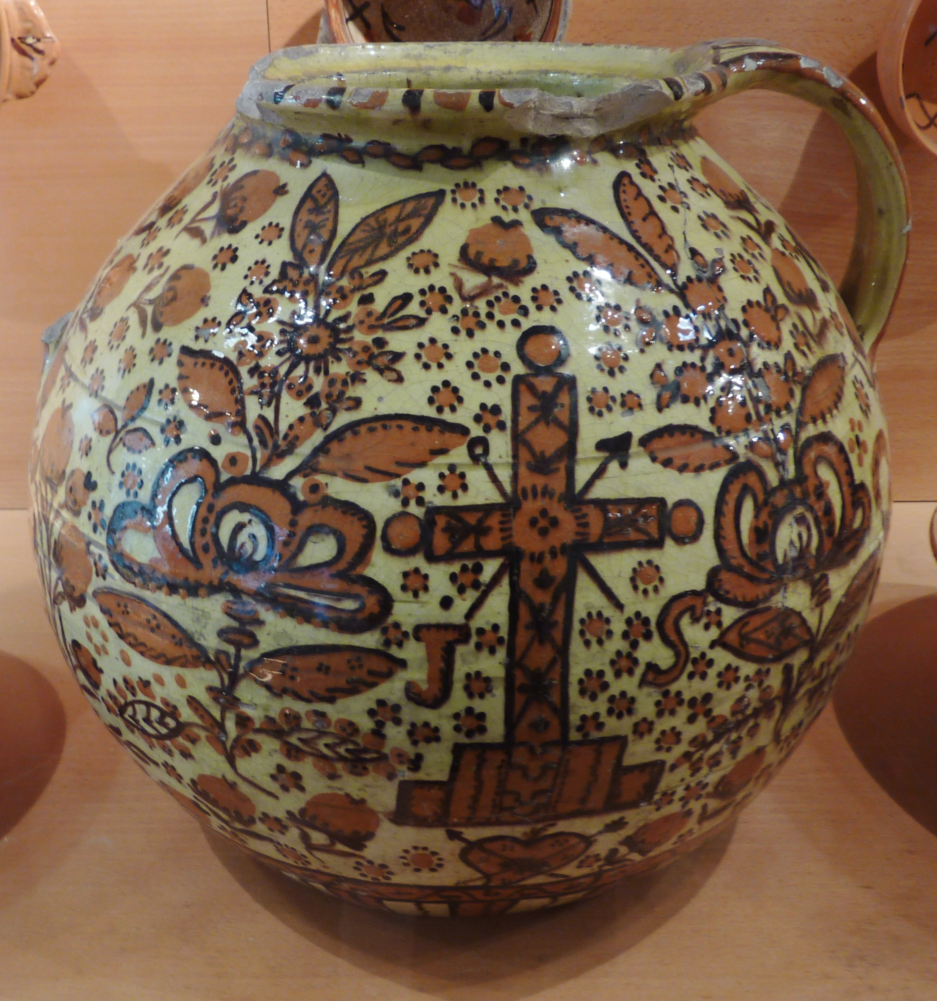 Faïence de Quimper : poterie vernissée aux engobes (peut-être Jean-Baptiste Bousquet, fin XVIIe, Musée de la faïence de Quimper)